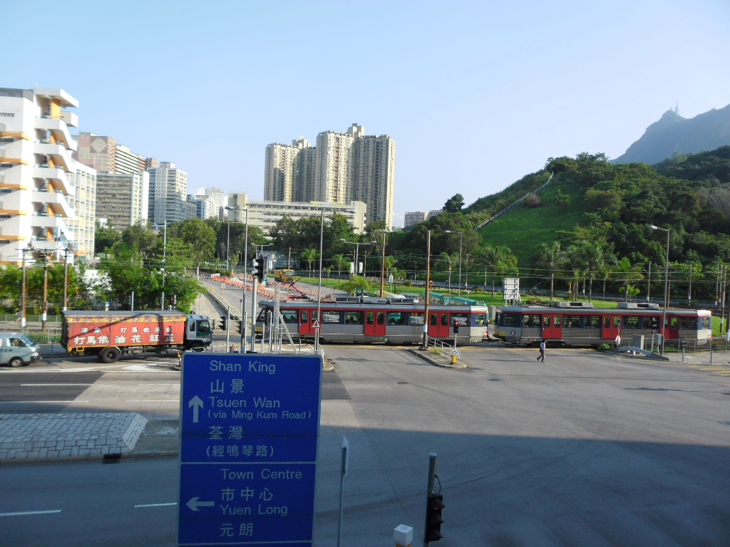 中文（香港）: 鳴琴路在田景路/青田路的交界處，左方為宣道中學